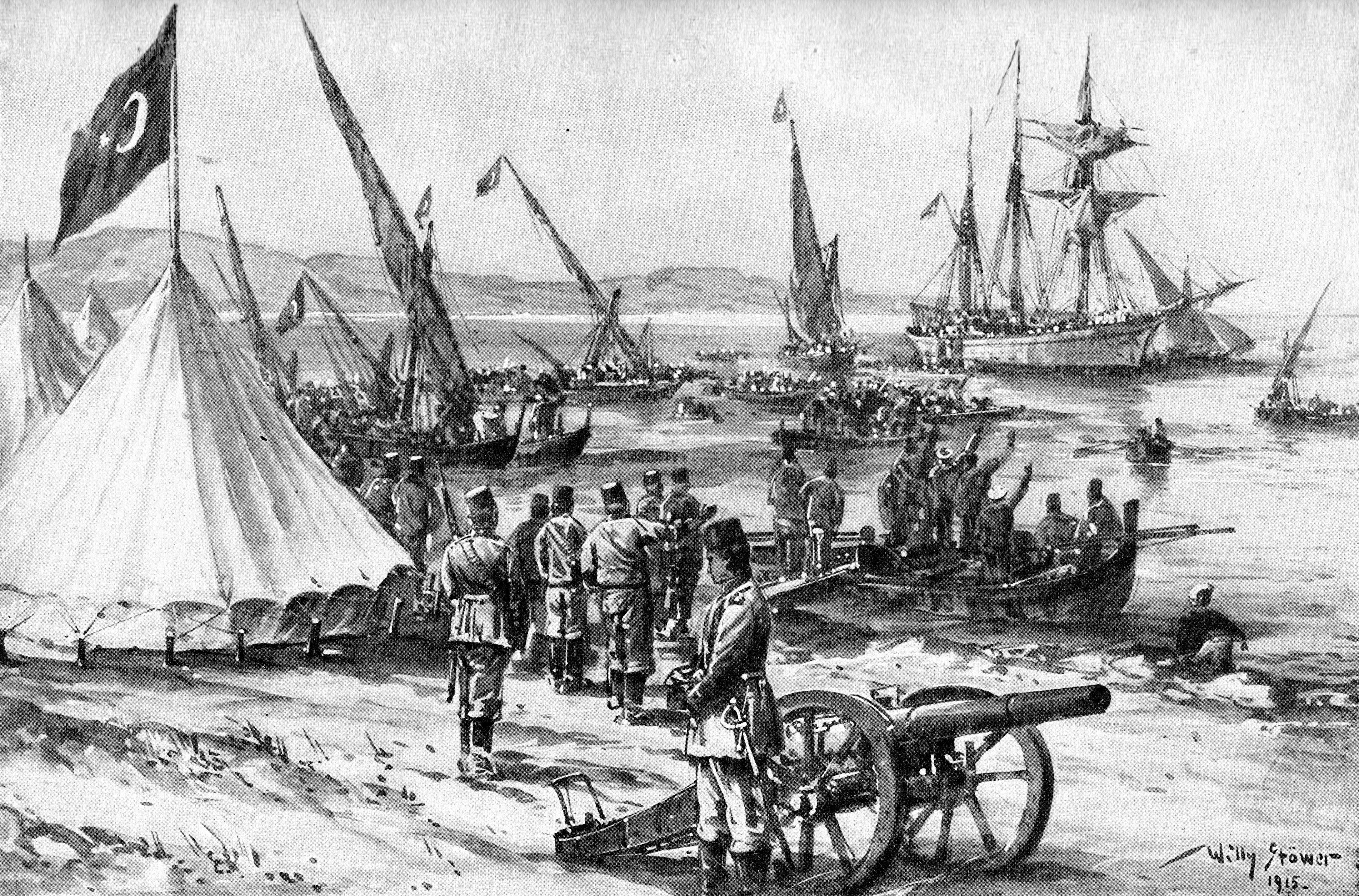 SMS AYESHA vor Hodeida im Janaur 1915. Gemälde von Willy Stöwer 1915. Tatsächlich war die AYESHA Wochen zuvor im Indischen Ozean versenkt worden, der Transport des EMDEN-Landungskorps erfolgte durch den Dampfer CHOISING. Vermutlich wurde das Bild nach 1916 nicht mehr publiziert.